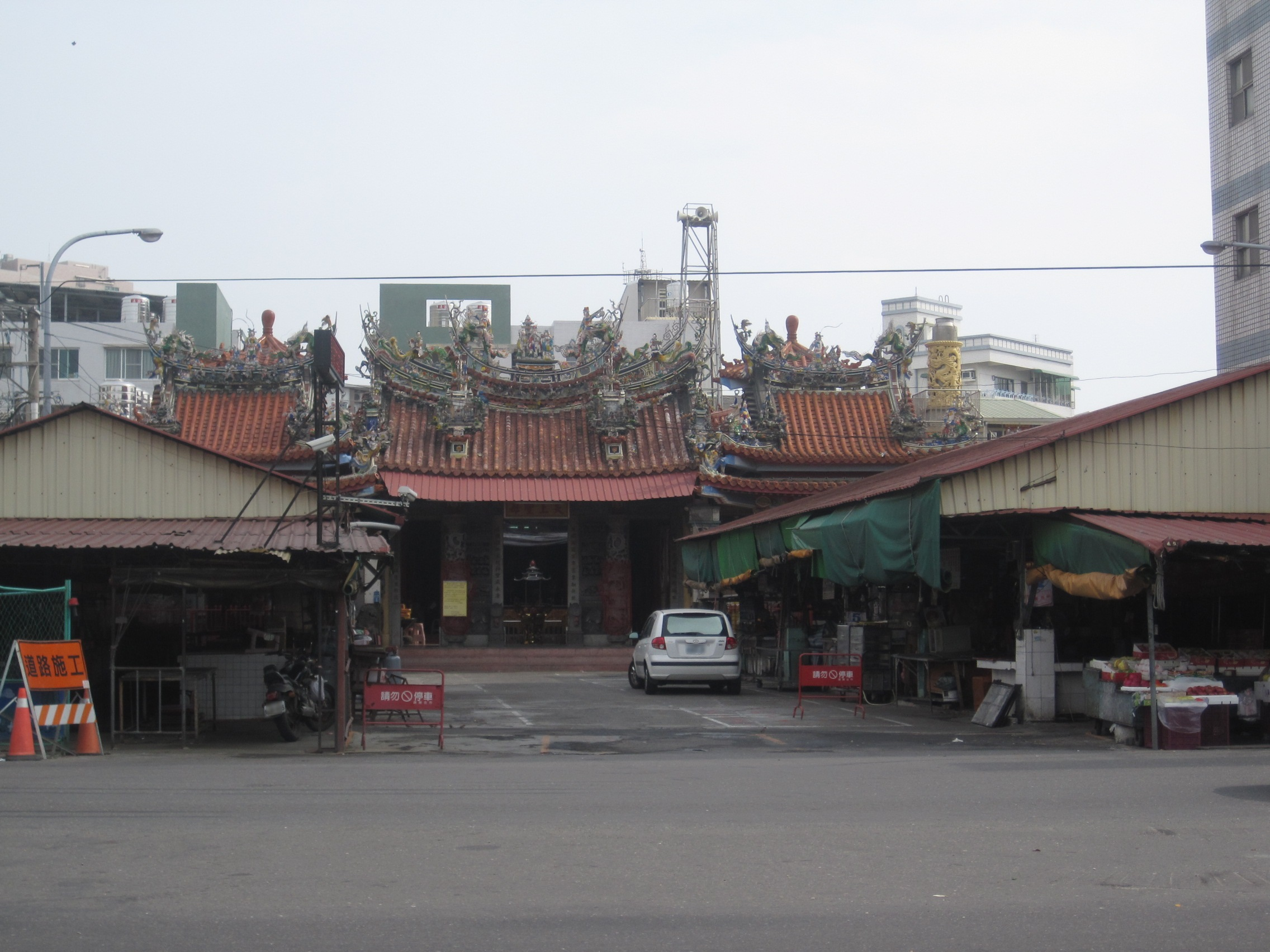 鹽行天后宮